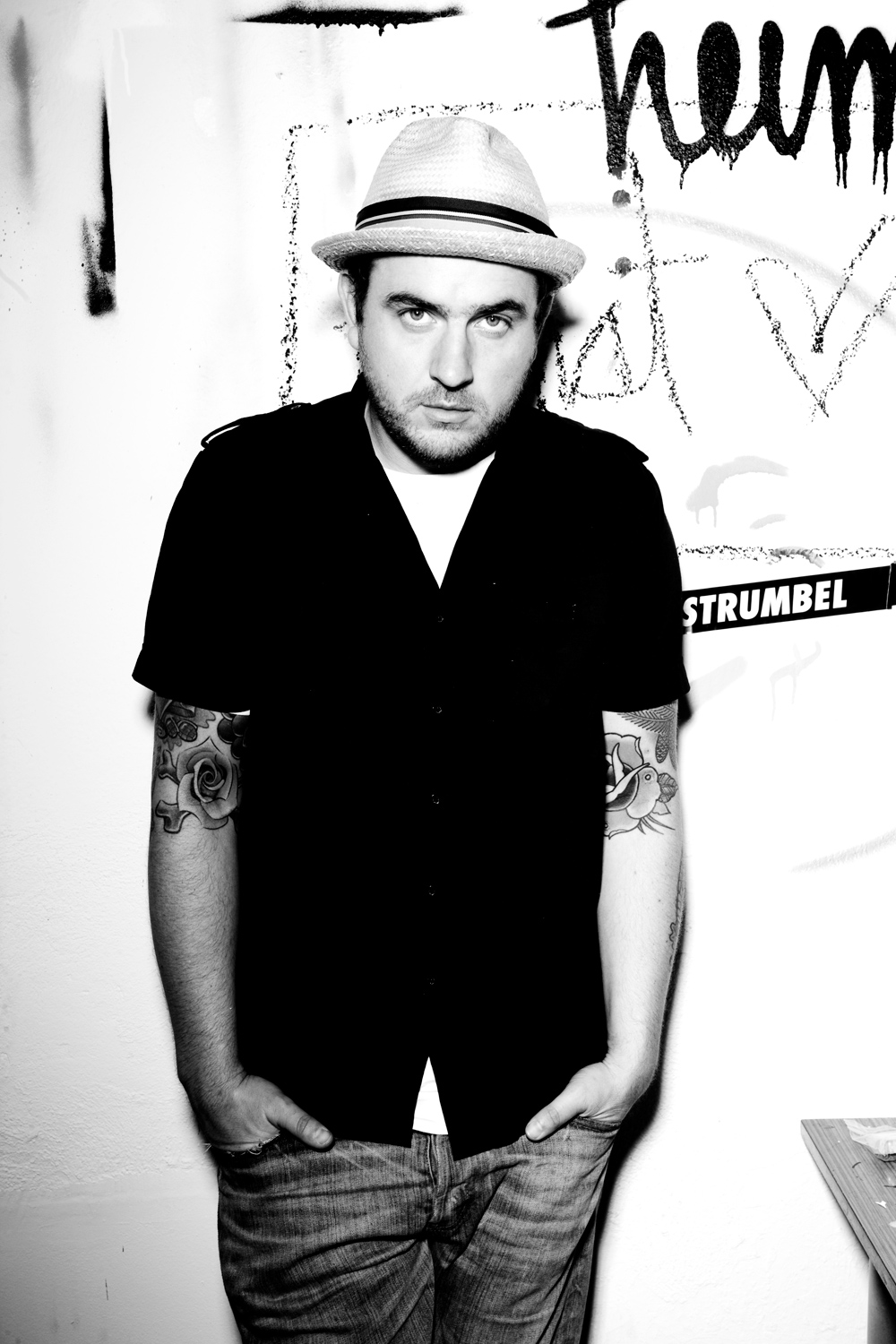 Stefan Strumbel, Selbstportrait